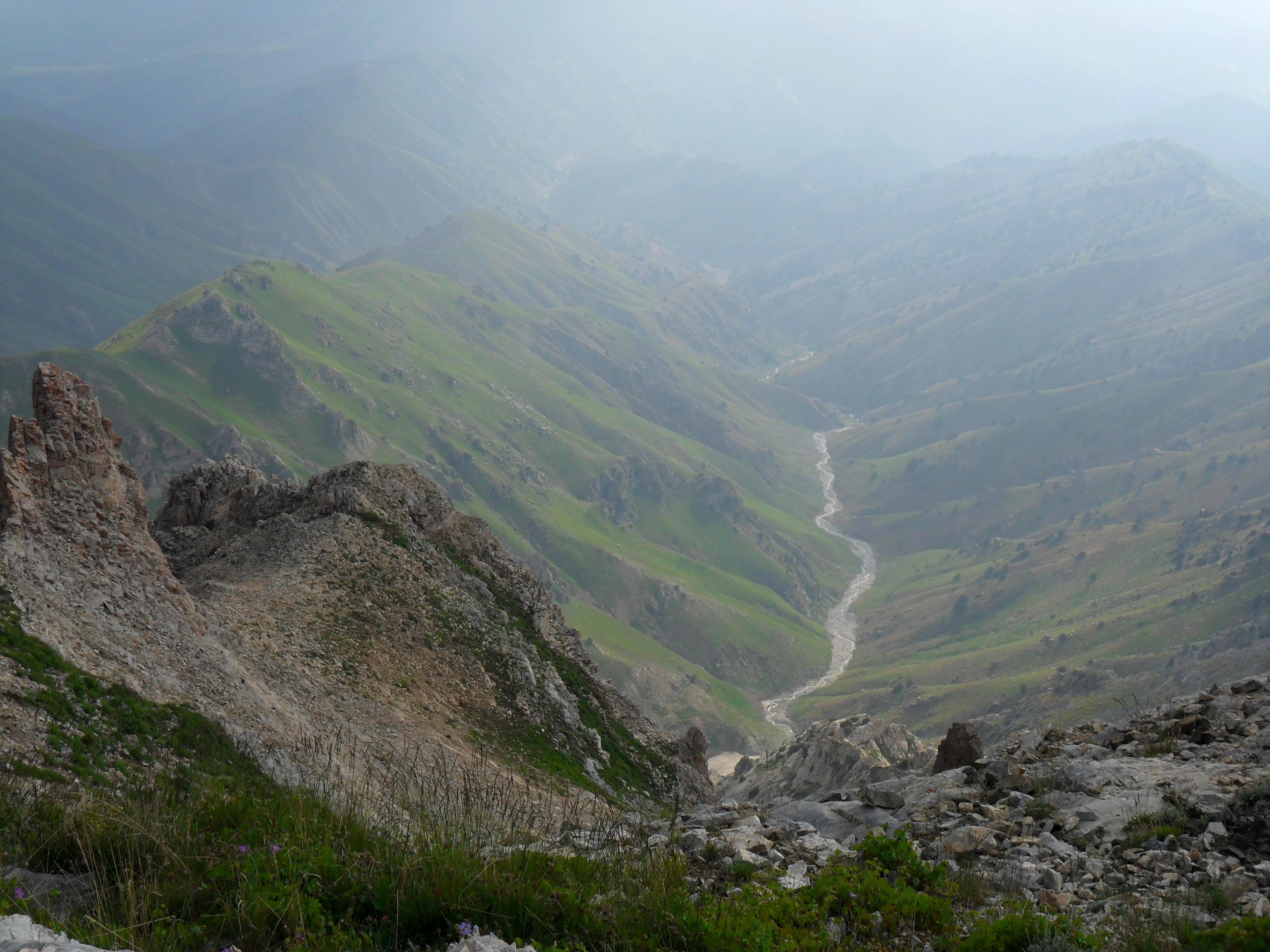 Долина реки Бельдерсай, вид с горы Чимган. Бостанлыкский район, Ташкентская область, Республика Узбекистан.